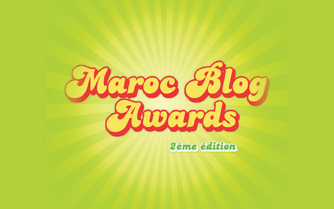 Logo de la 2ème édition des Maroc Blog Awards